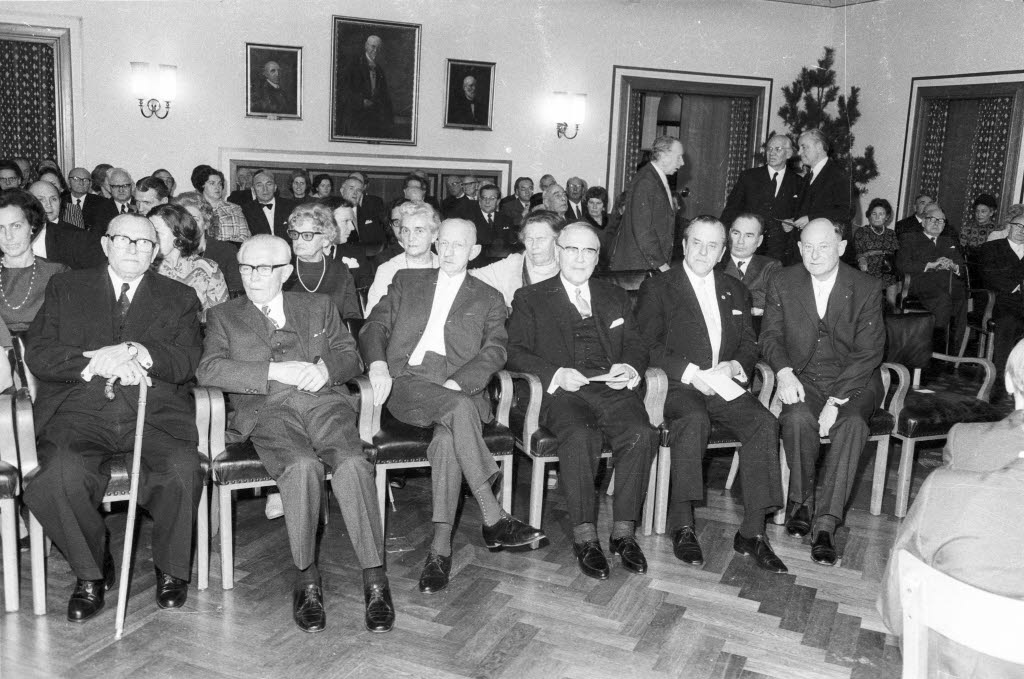 Vorn v.l. die Preisträger Franz Stolze, Hans Stade, Dirk Feldmann (vermutlich), Walter Breitenstein, Karl Bommes, Pastor Plath.